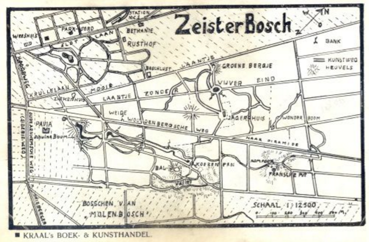 Kaart uit 1907, waarop onder meer Pavia, het Jagershuis en de Bosbeek zijn ingetekend